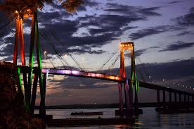 Puente General Belgrano de noche.